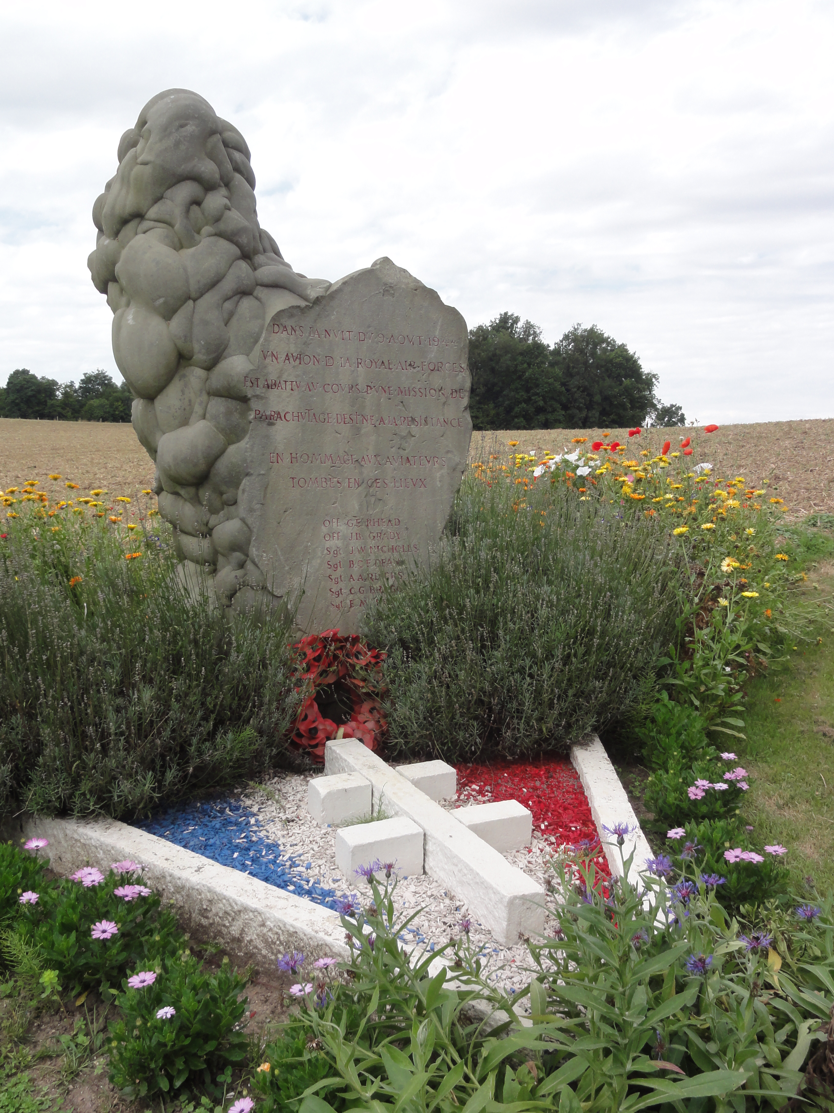 Cugny (Aisne) monument des aviateurs 1944